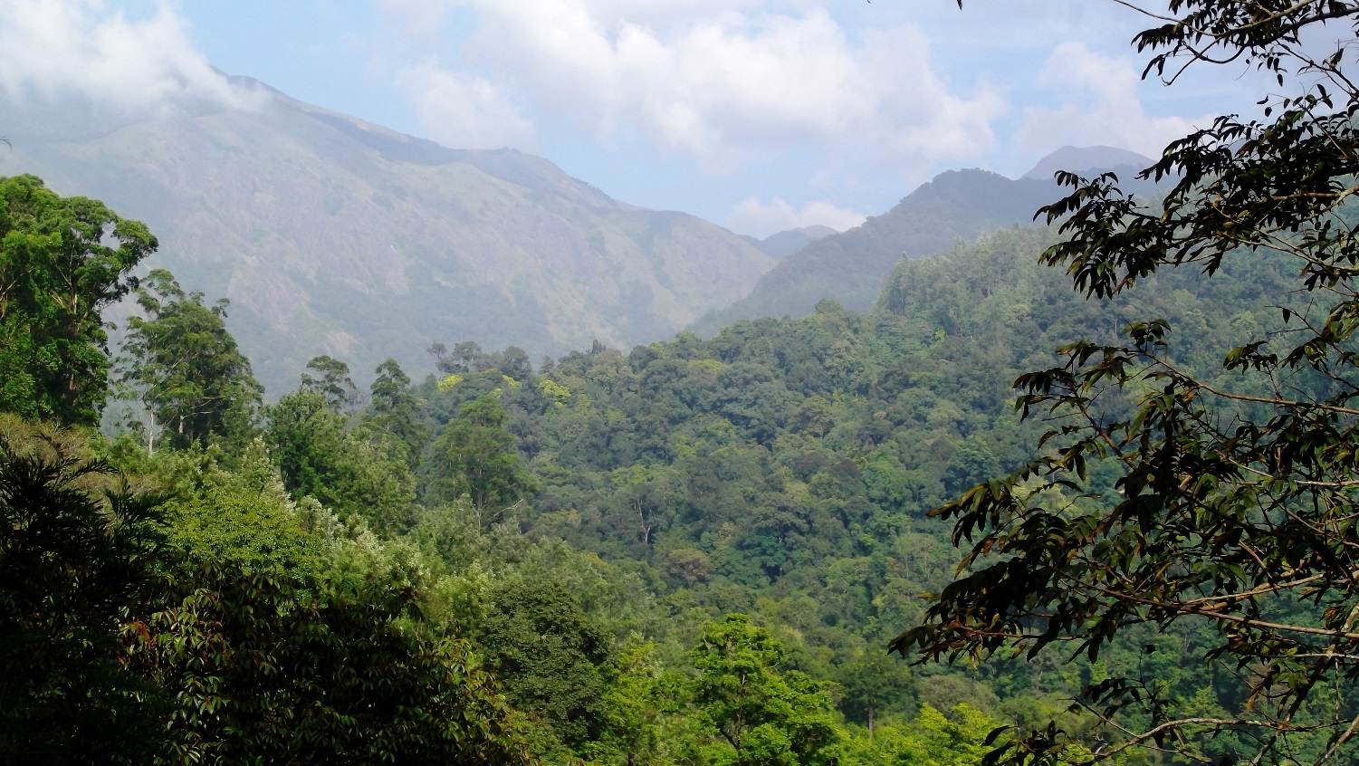 Valparai Hill Station